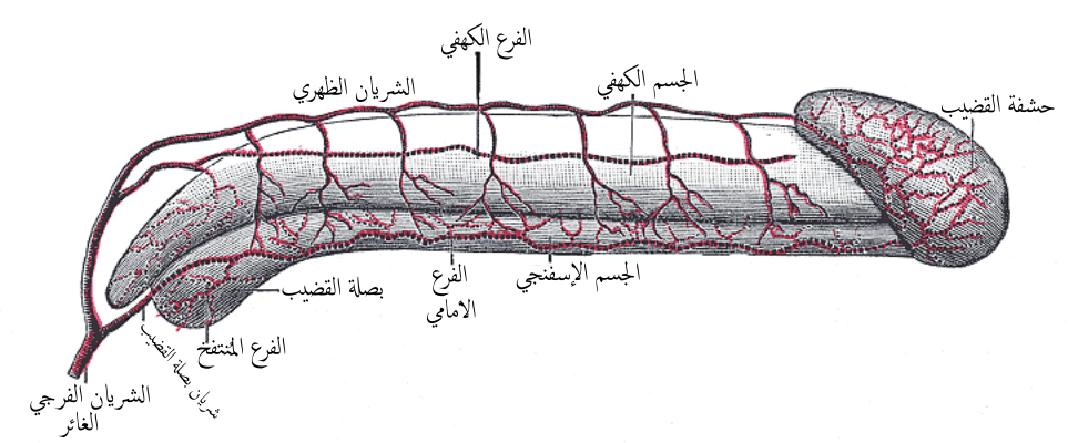 رسمٌ بياني يُظهر شرايين قضيب الإنسان.